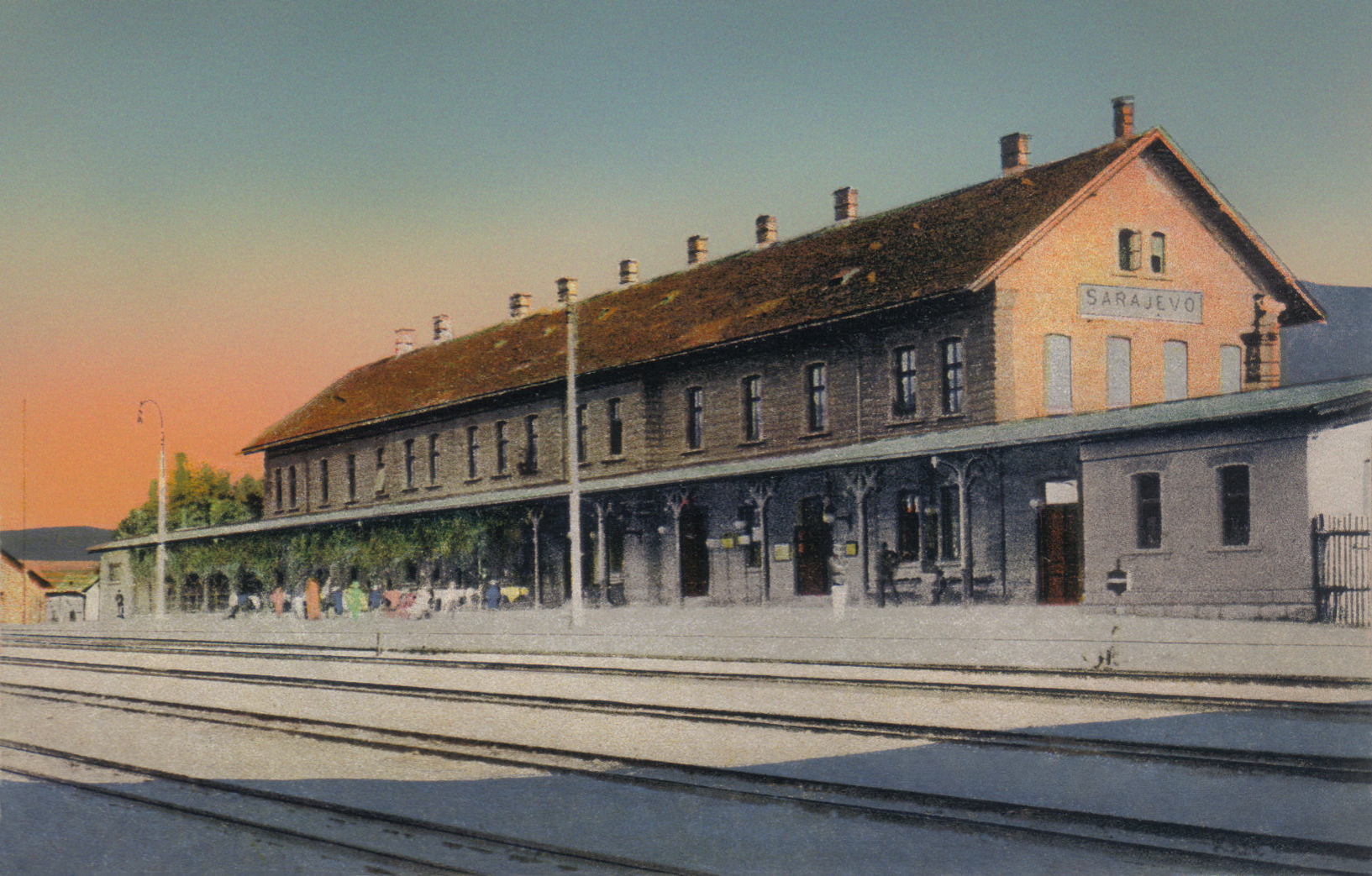 Bahnhof Sarajevo, Aufnahmsgebäude